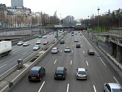 Phériphérique parisien